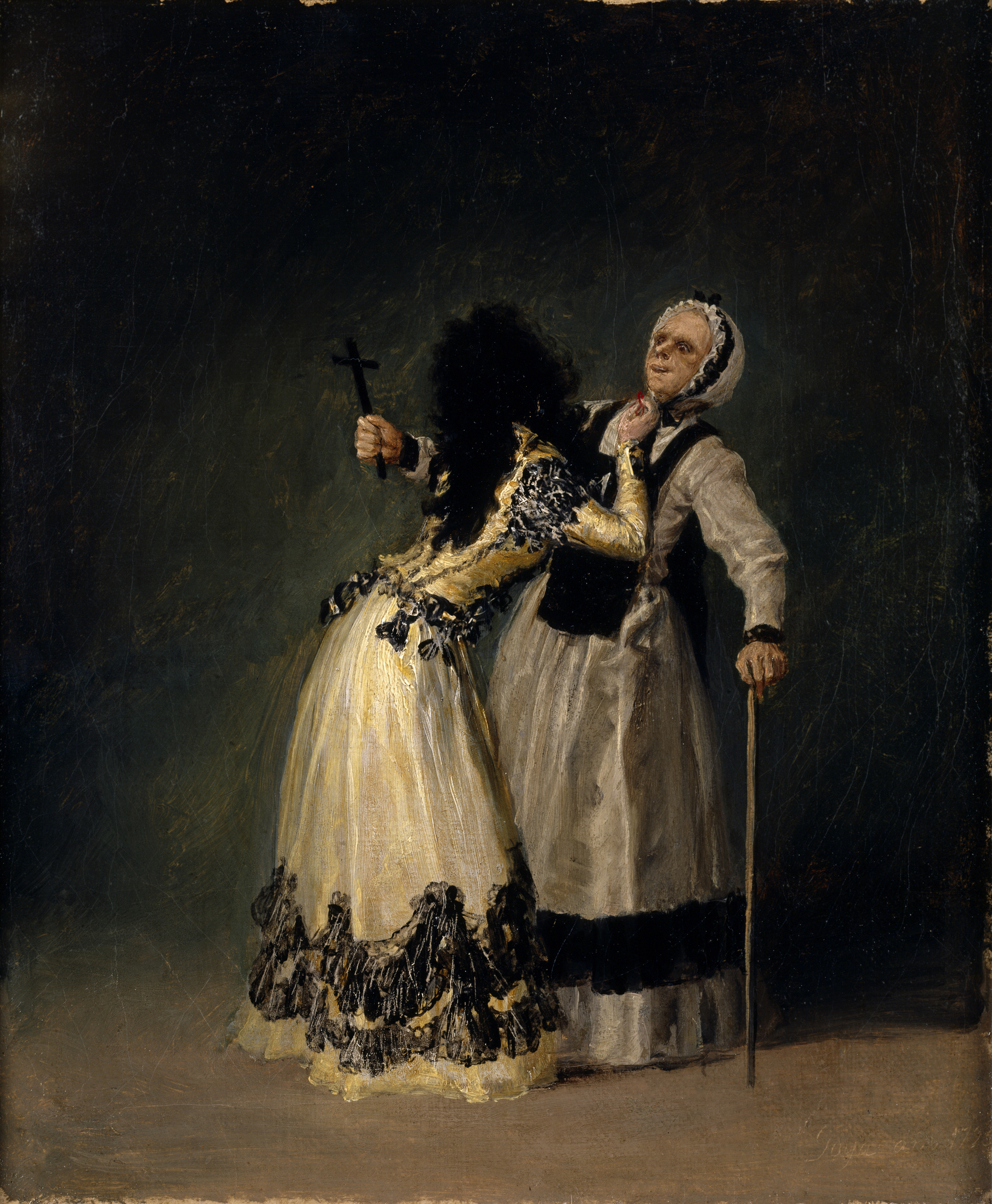 La duquesa de Alba y su dueña o La Duquesa de Alba y "la Beata". Óleo sobre lienzo. 30,7 x 25,4 cm.